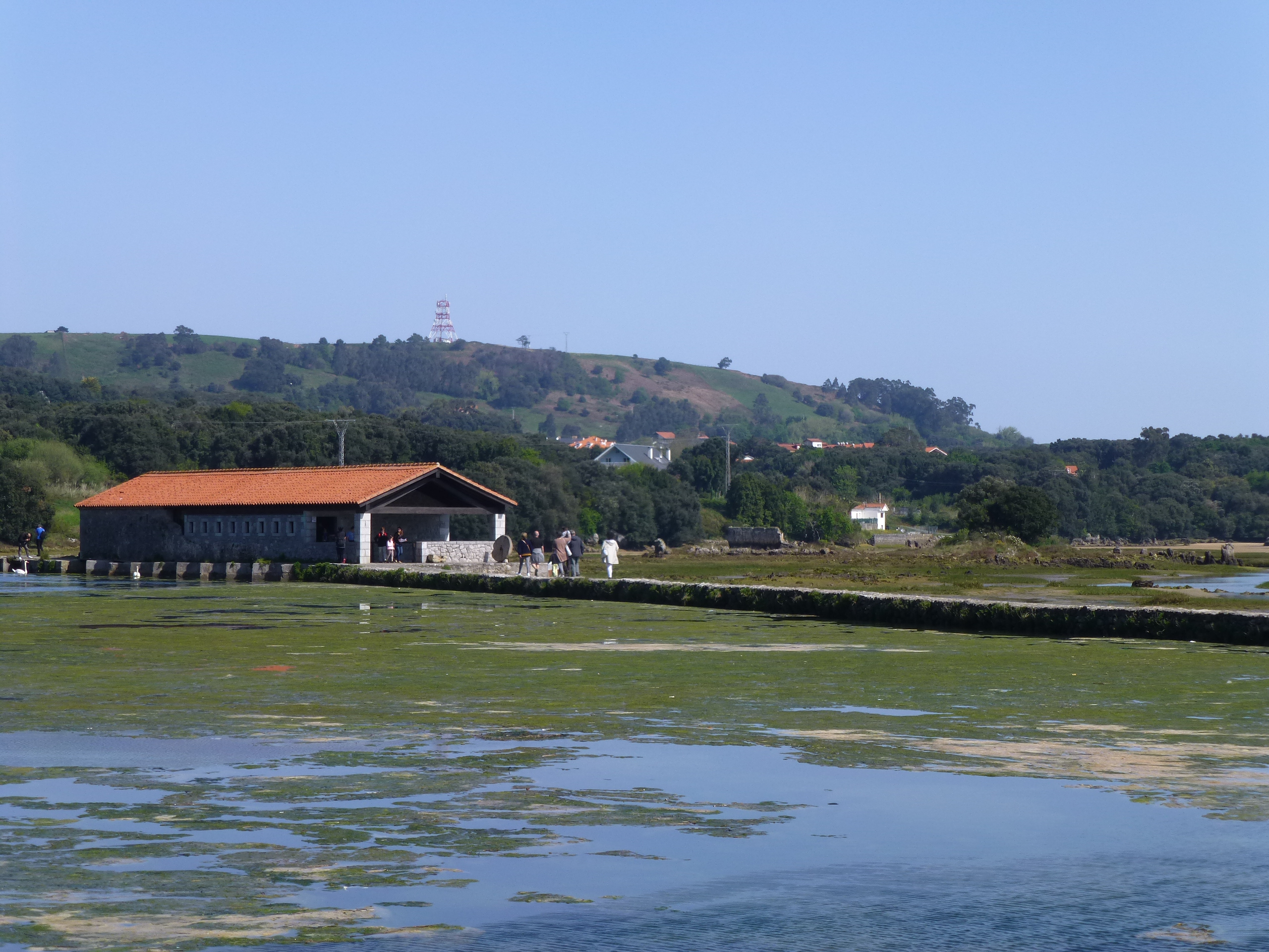 Vista general del molino de marea de Santa Olaja en el Parque Natural de las Marismas de Santoña, Victoria y Joyel en Arnuero , Cantabria (España).